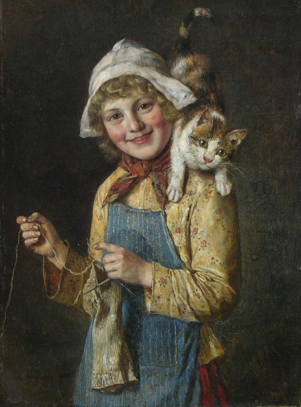 Rudolf Hirth du Frênes, Young Friends, oil on canvasmedium QS:P186,Q296955;P186,Q12321255,P518,Q861259